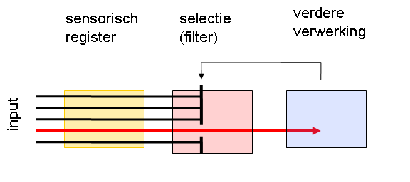 Filtertheorie